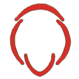 Morfología del perianto. Prefoliación vexilar. Según UNNE, Morfología de Plantas Vasculares, .ar